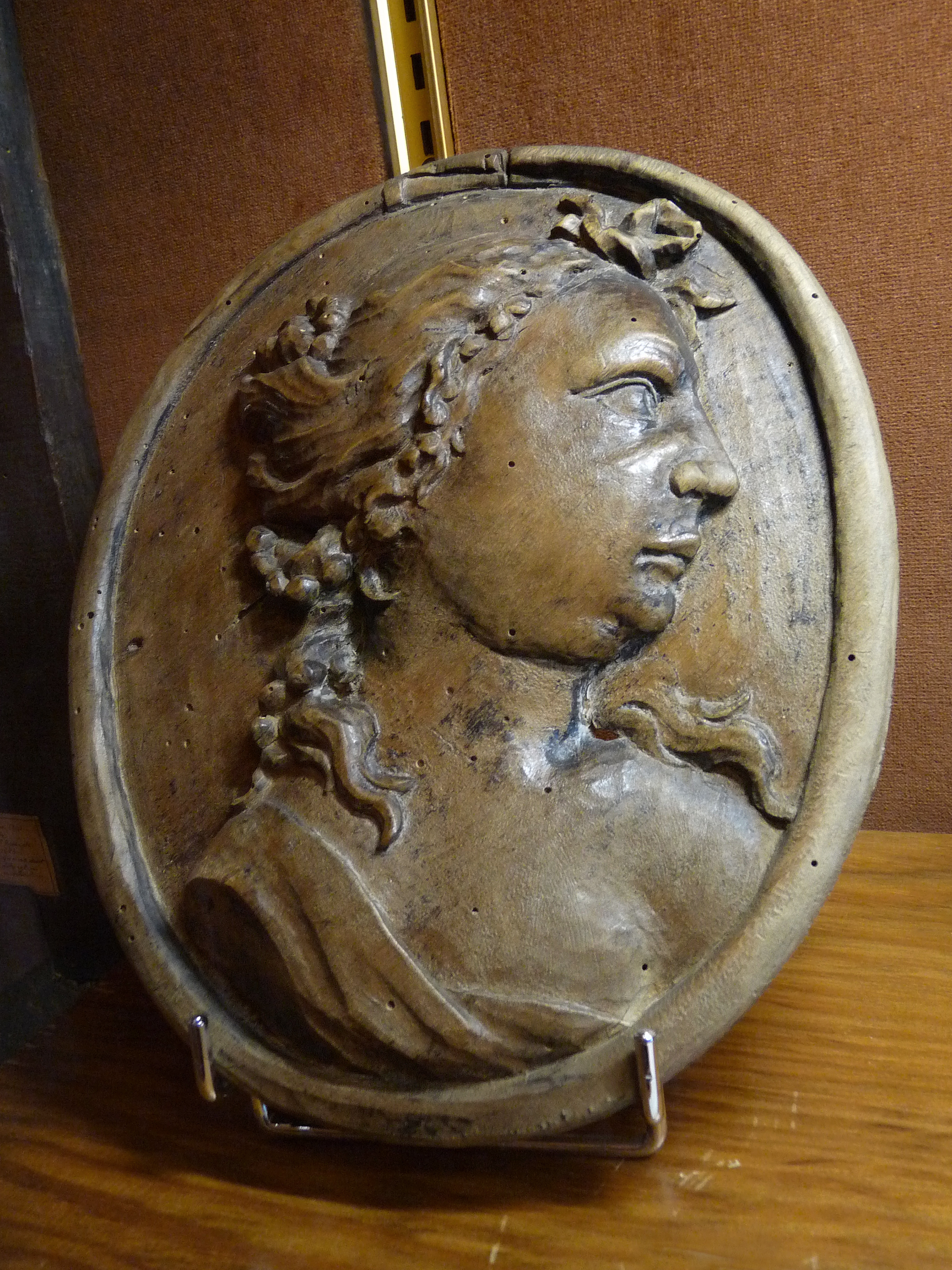 Remiremont, musée Charles Friry : buste de (Marie)-Christine de Saxe. XVIIIe siècle. Bois. Christine de Saxe fut abbesse du chapitre de l'abbaye de Remiremont (1773-1883)